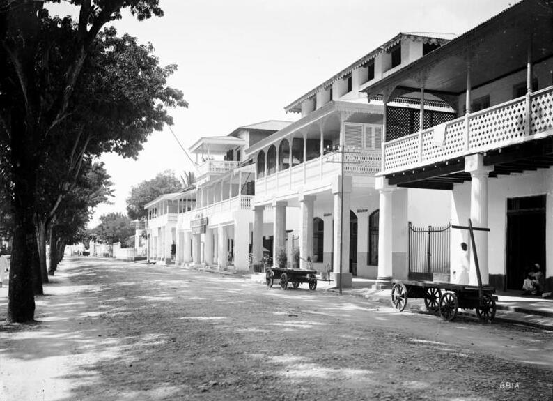 Tanga, Kaiserstr. bei der Usambarapost